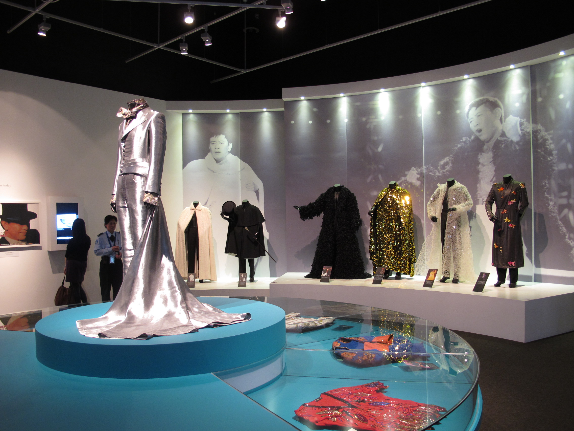 Applauding to Hong Kong Pop Legend: Roman Tam Exhibition 「獅子山下‧掌聲響起‧羅文」展覽